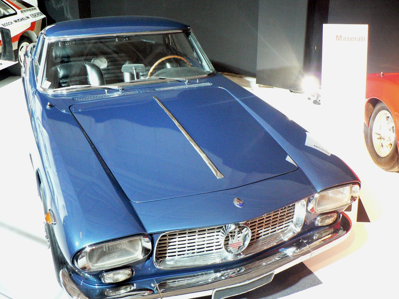 Mondial de l automobile de Paris (October 2006)